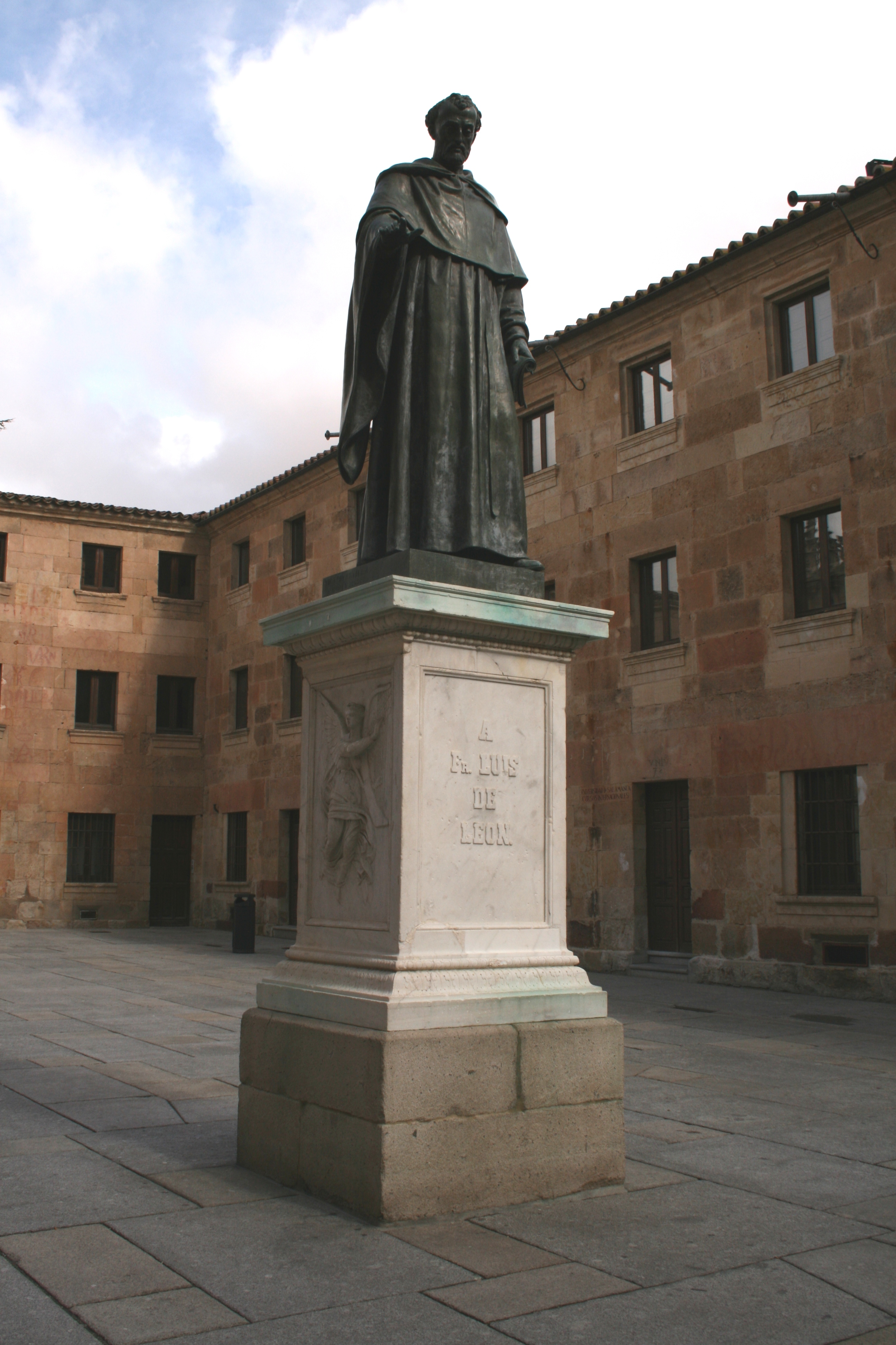 Estatua de Fray Luis de León